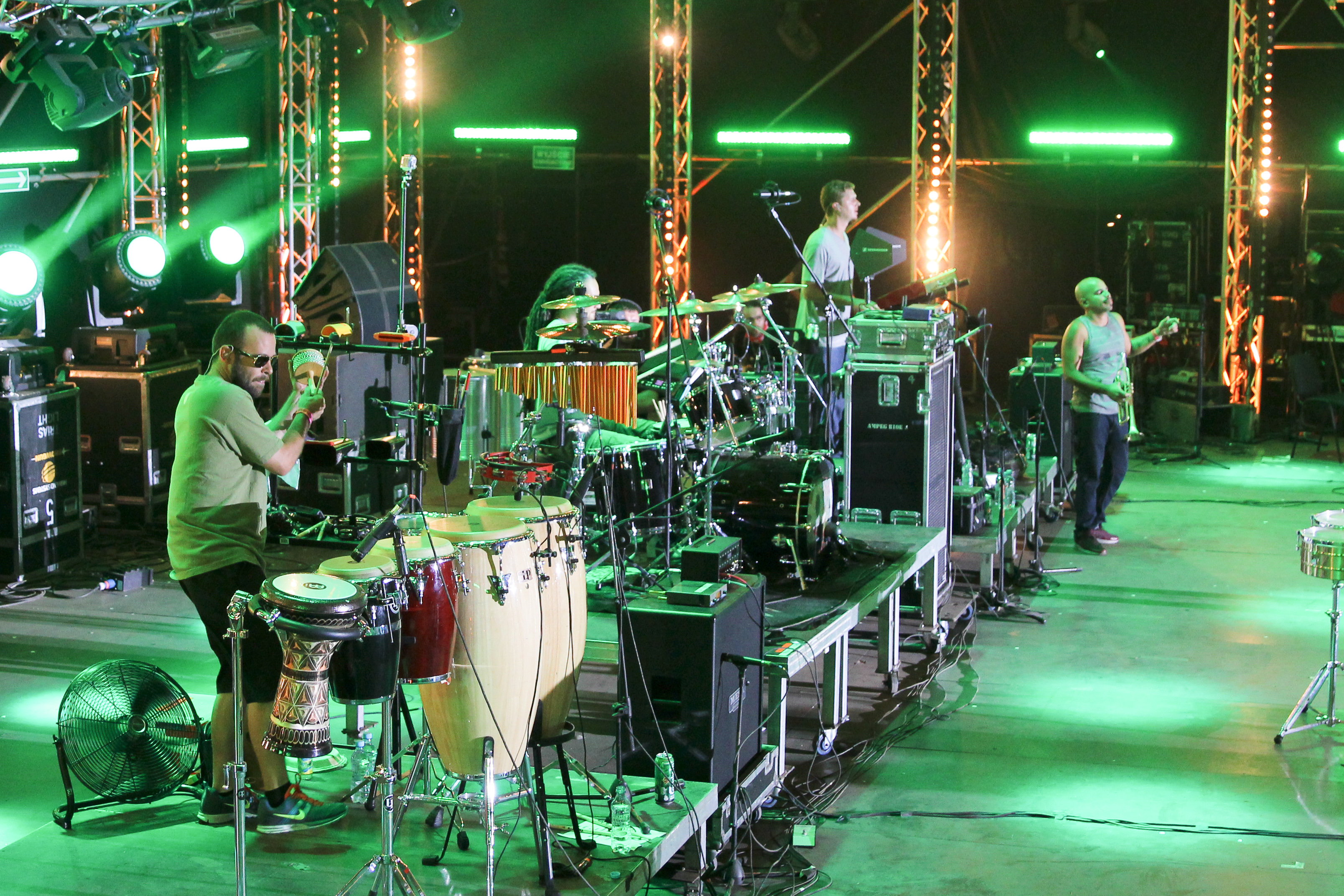 Zespół reggae SOJA na Przystanku Woodstock w 2013 r.